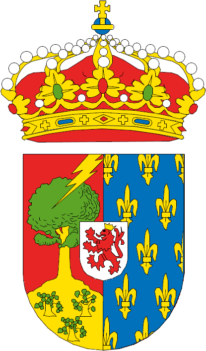 Escudo de Albondón, en Granada (España)